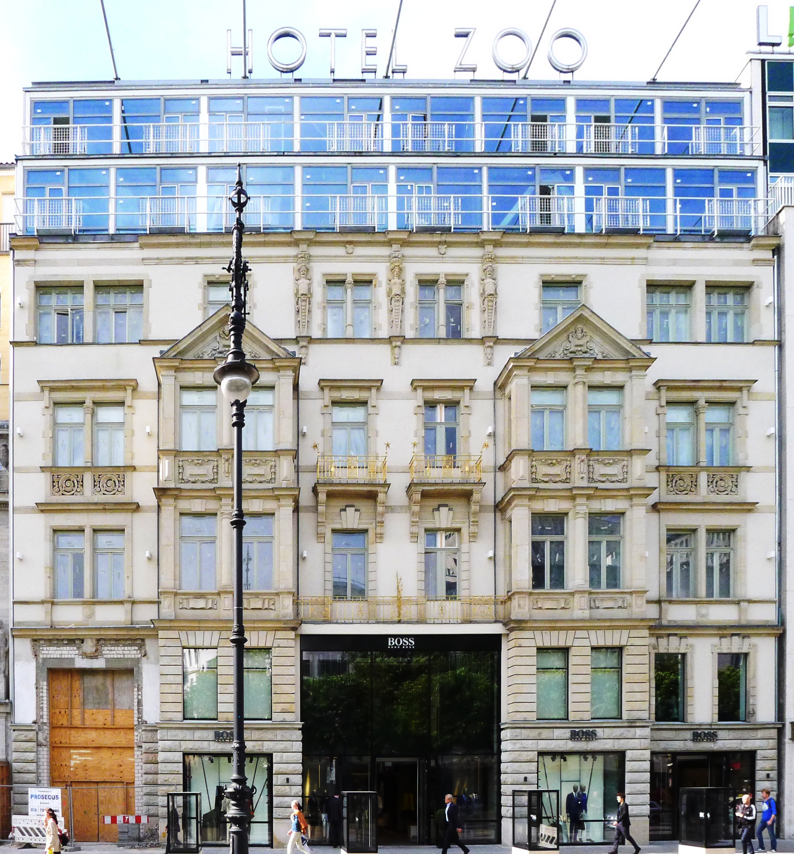 ehemaliges Hotel am Zoo